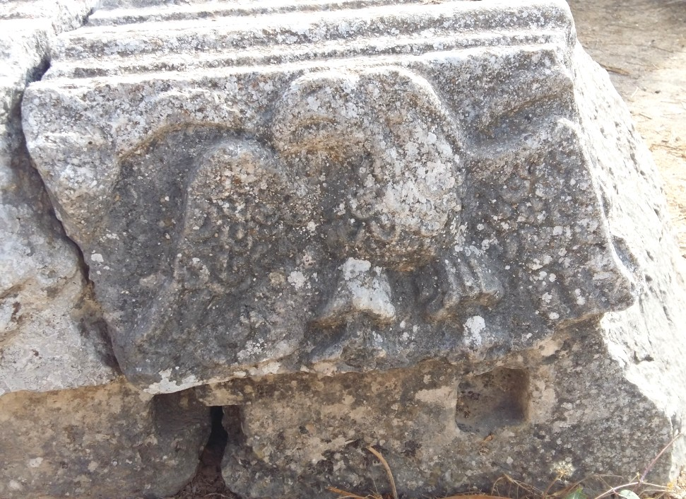 תבליט העיט על משקוף חורבת בית הכנסת בגוש חלב